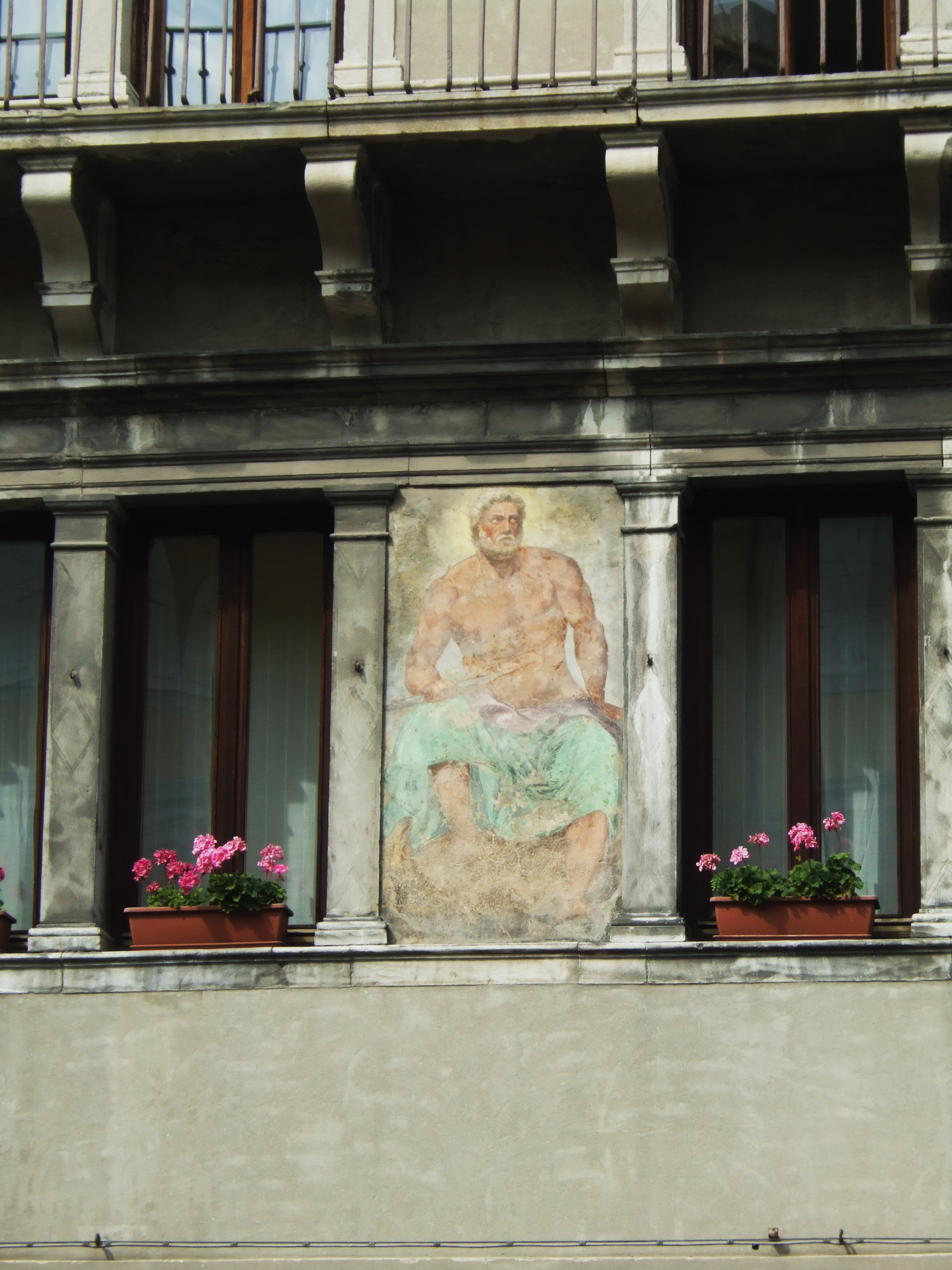 Udine - Affresco via Mercatovecchio - Giove - Autore: Giovanni Battista Grassi